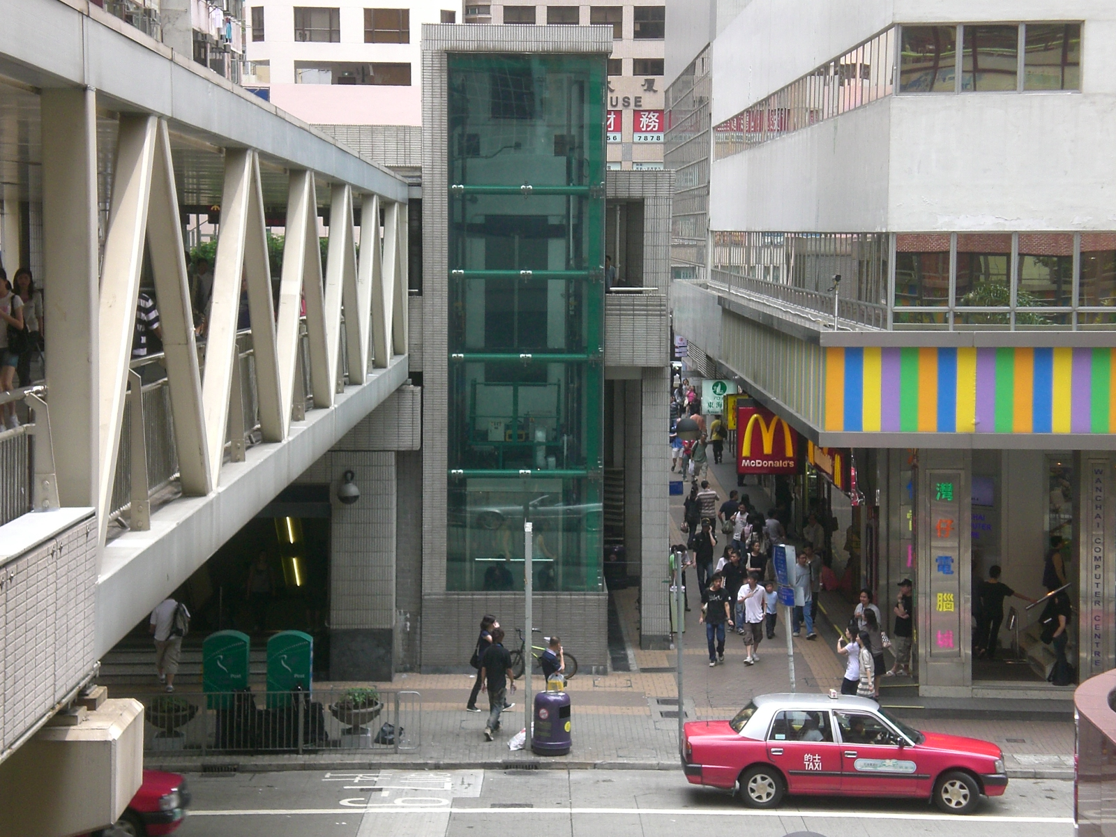 軒尼詩道灣仔電腦城及zh:灣仔至灣仔北行人平臺升降機